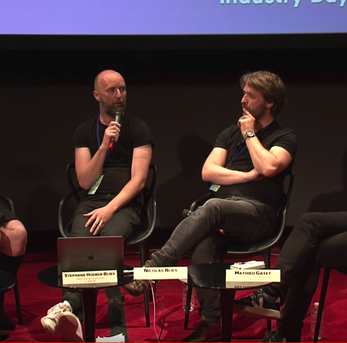 Les frères Blies à New Images Festival 2019 Paris